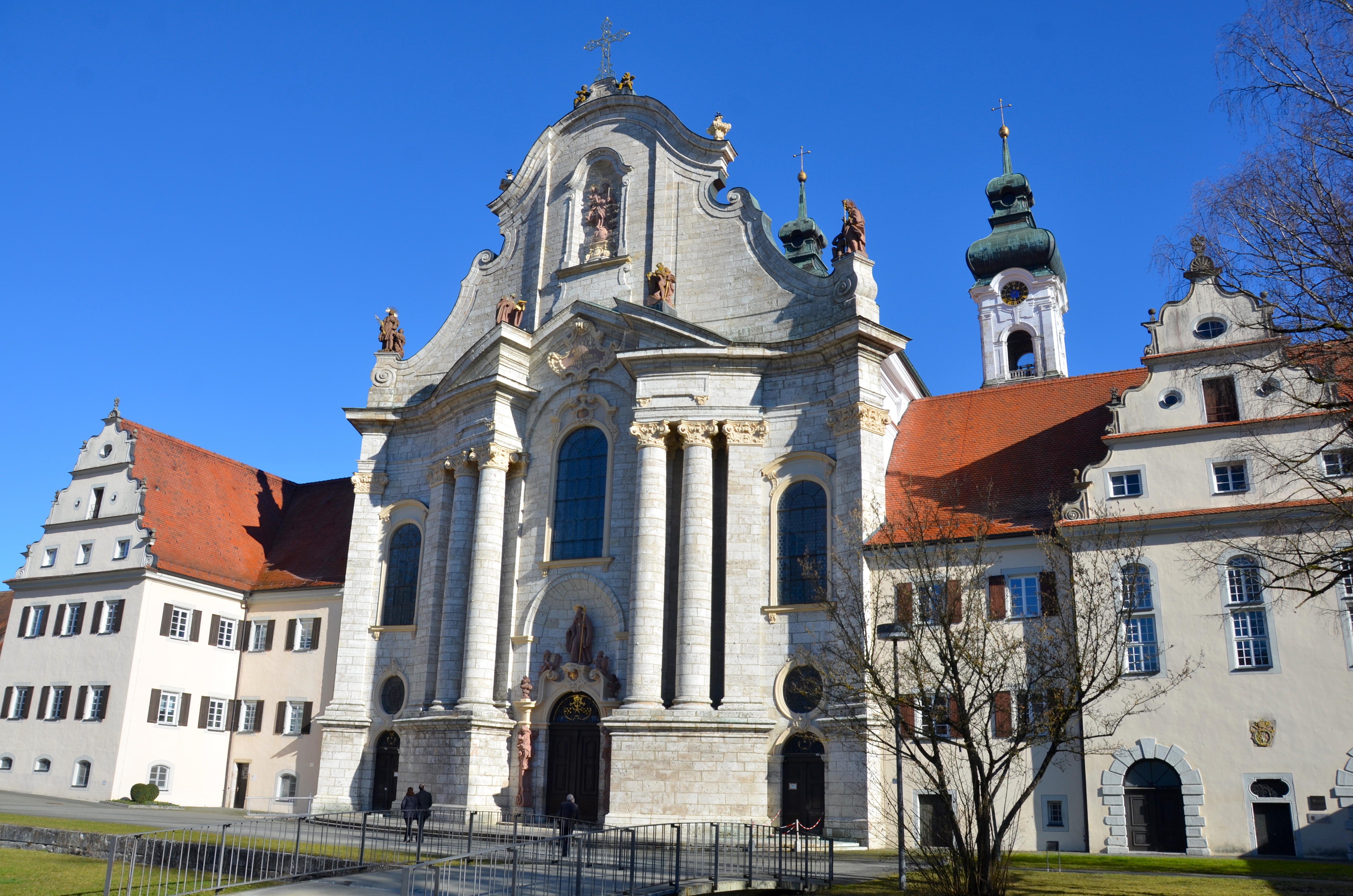 Münster Unserer Lieben Frau in Zwiefalten (Baden-Württemberg)